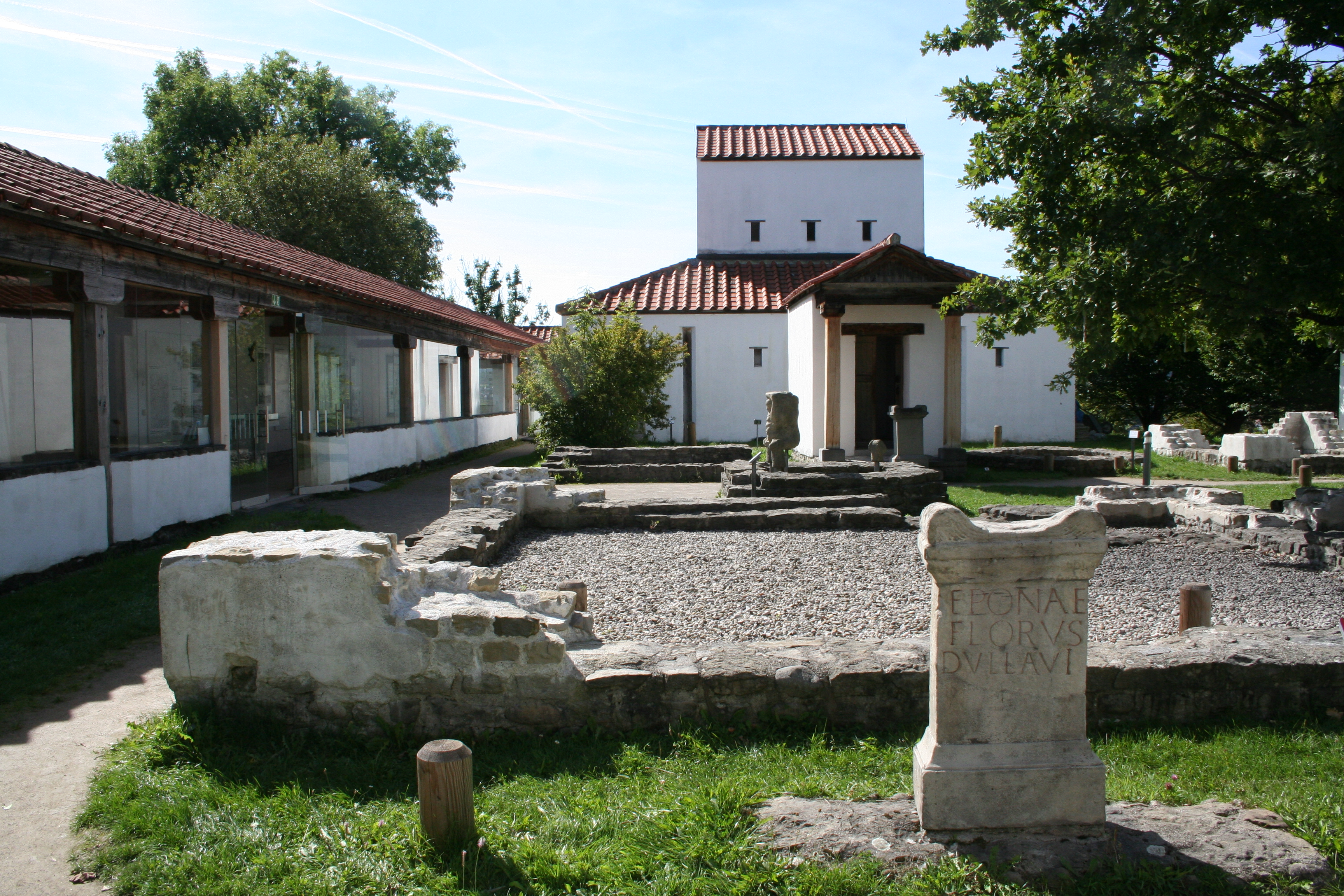 Archäologischer Park Cambodunum, Kempten